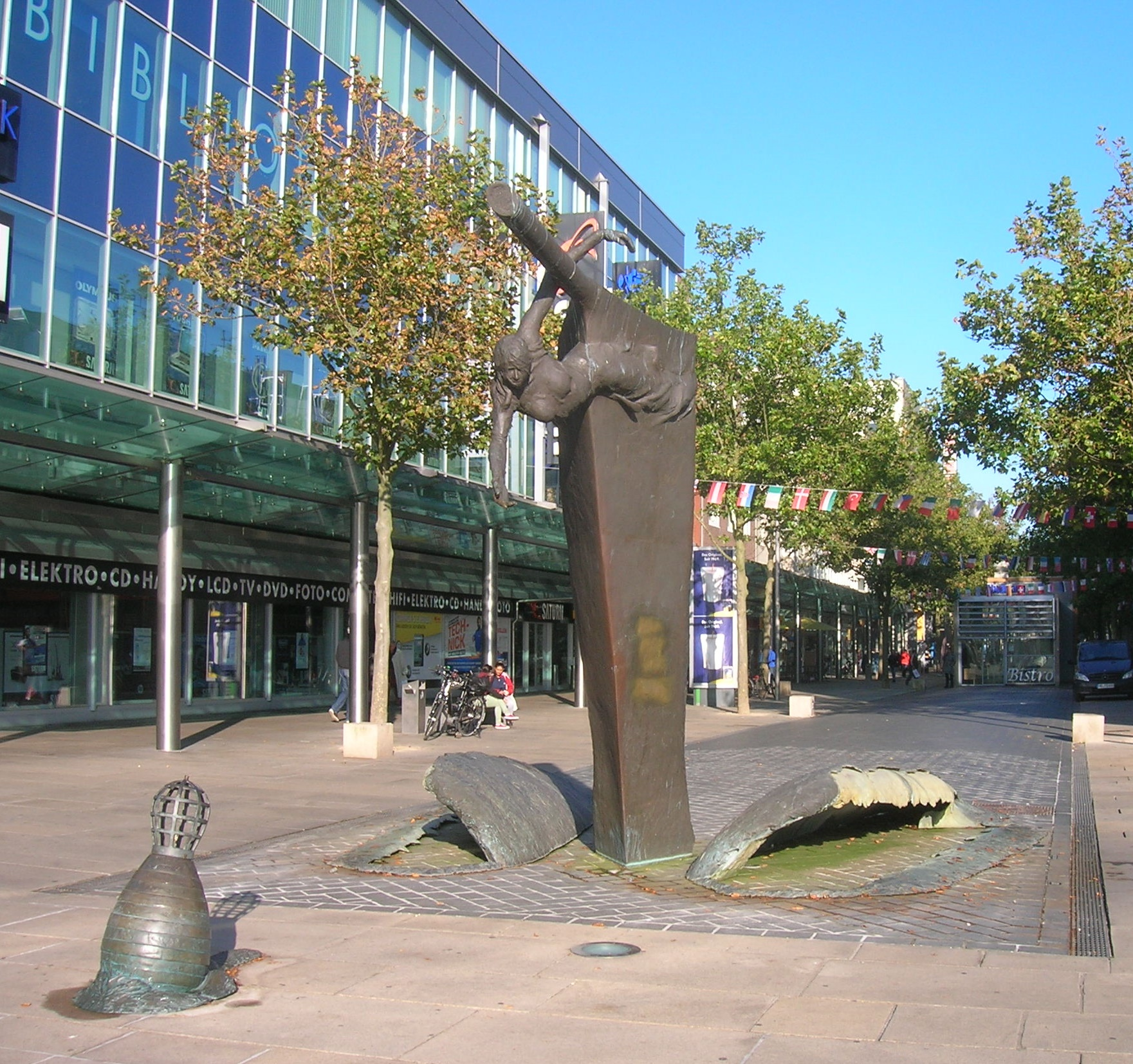 Denkmal „Bugwelle“ in Bremerhaven-Mitte